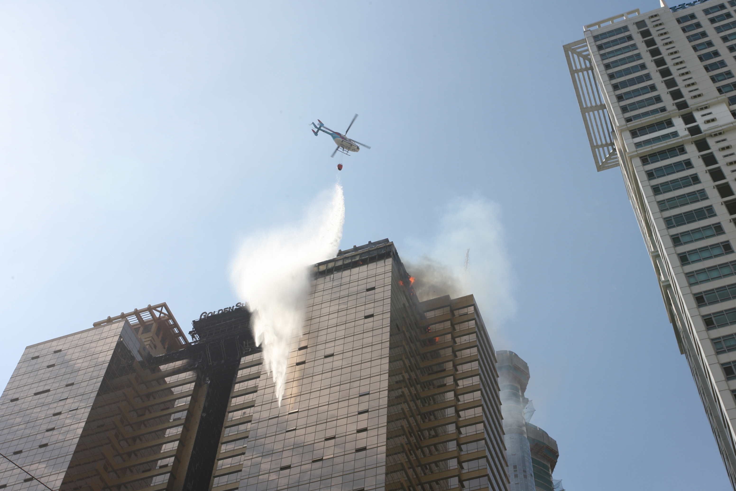 우신골든스위트 화재 사고